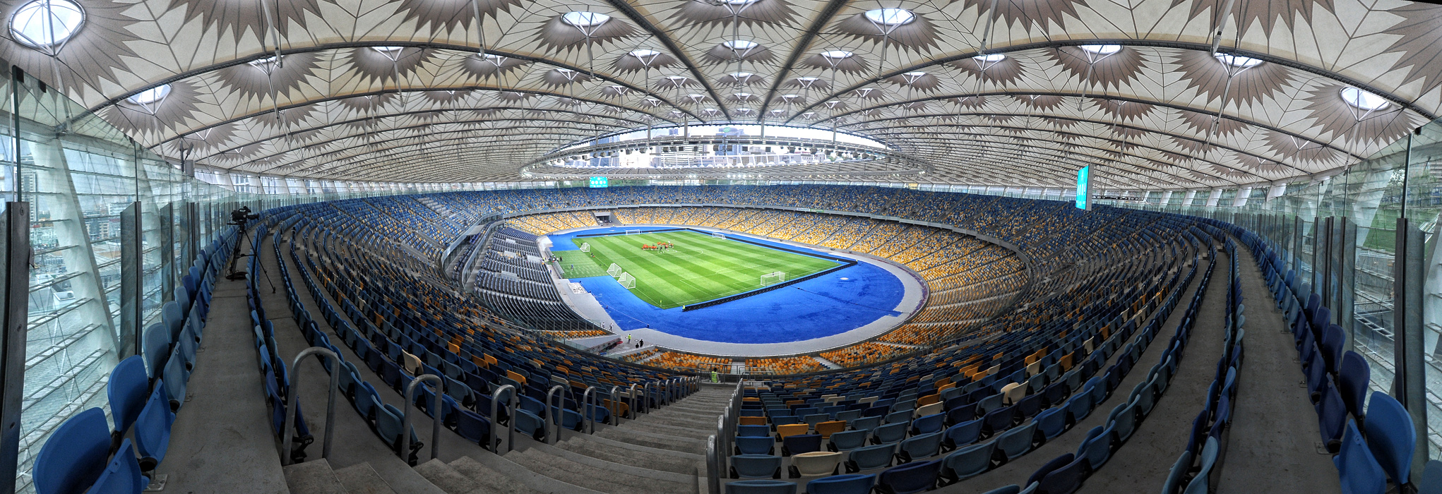 Panorama 2012-05-05 stadium